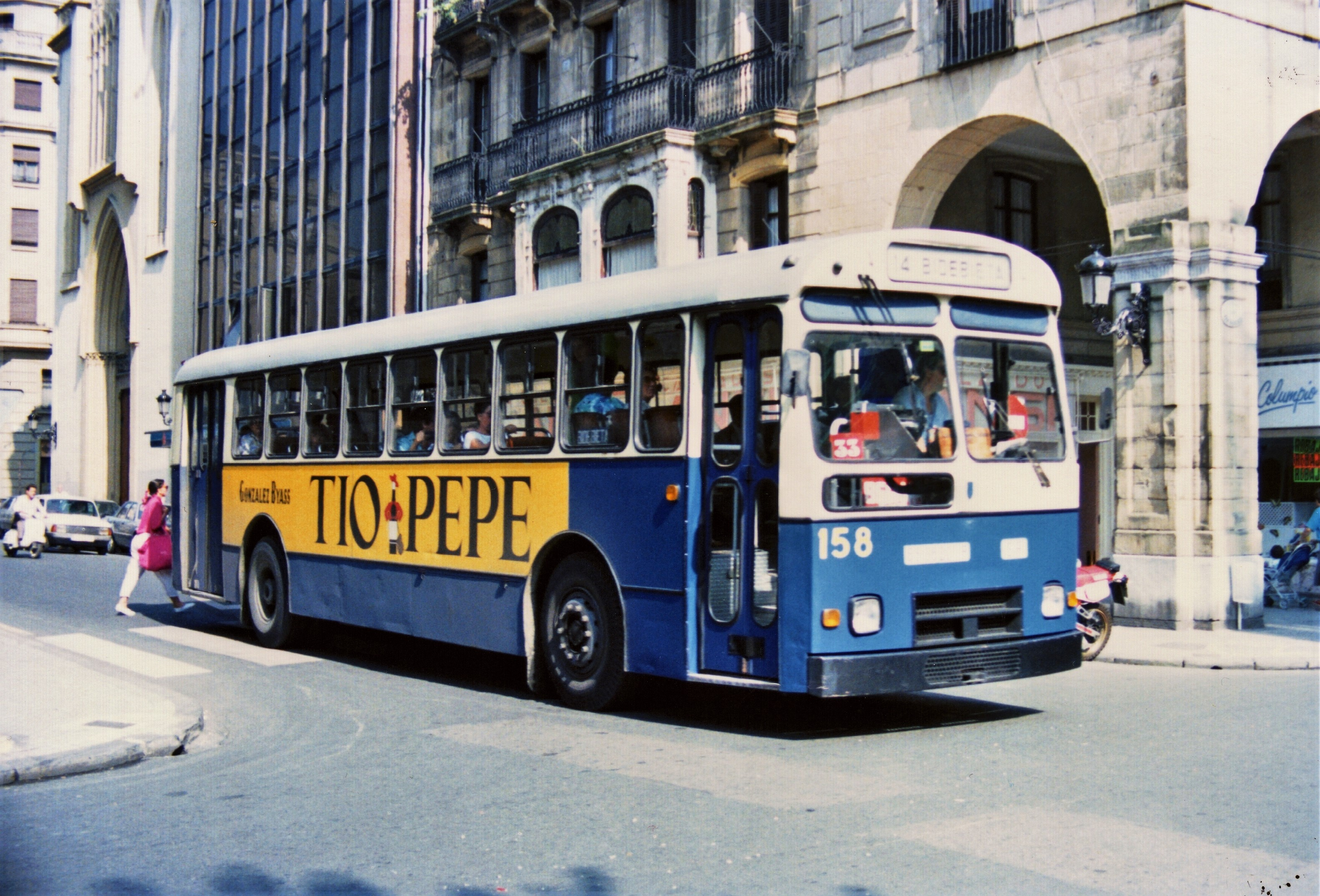 El autobús número 158 de CTSS (Compañía del Tranvía de San Sebastián), un Pegaso 6035/4 con puertas delantera y trasera, prestando servicio en la línea urbana 14 a Bidebieta.